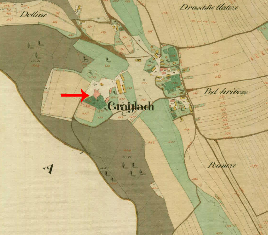 Franciscejski kataster za Kranjsko, 1823-1869